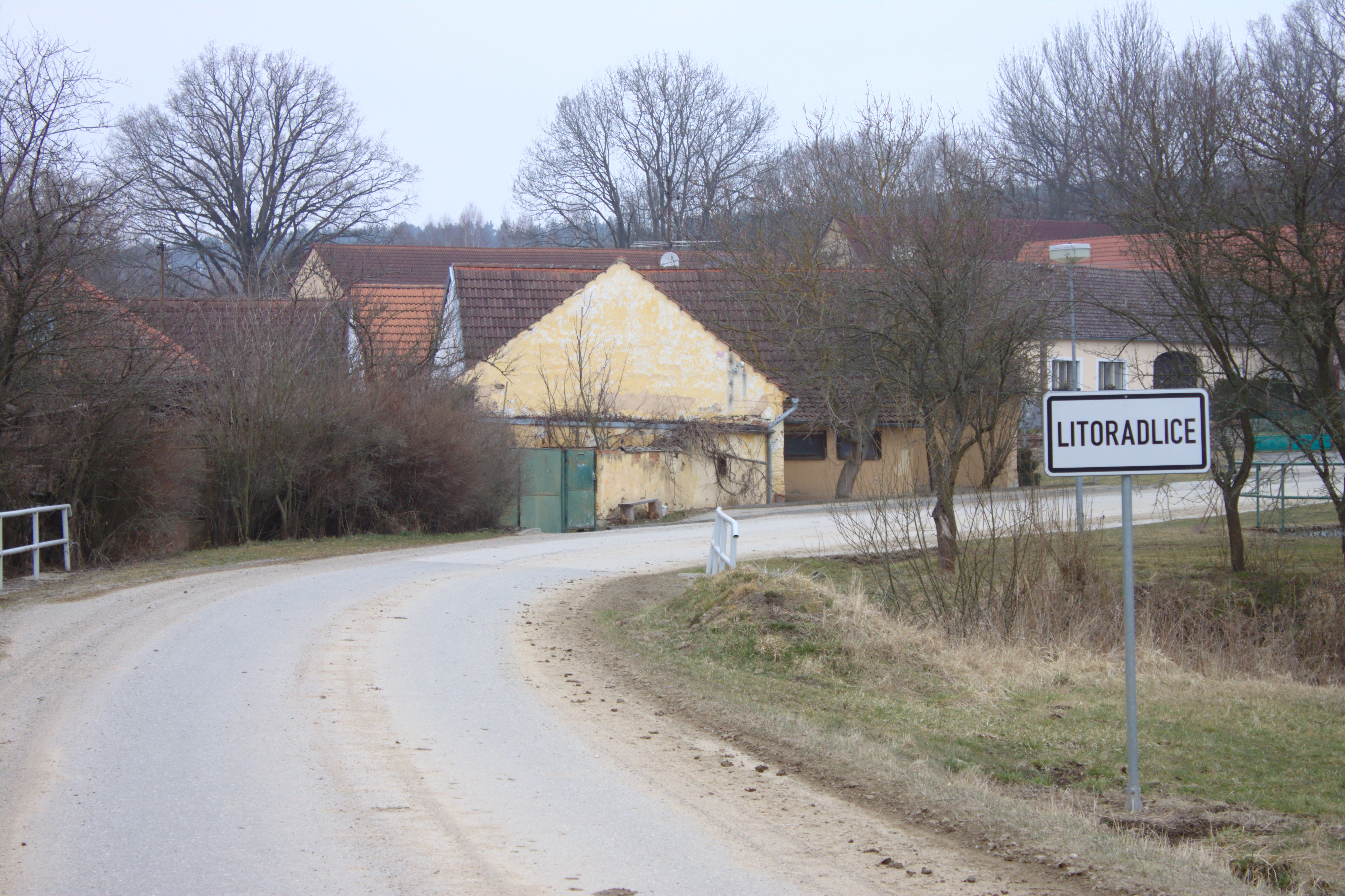 Okraj obce ve vesnici Litoradlice Project: Fotíme Česko